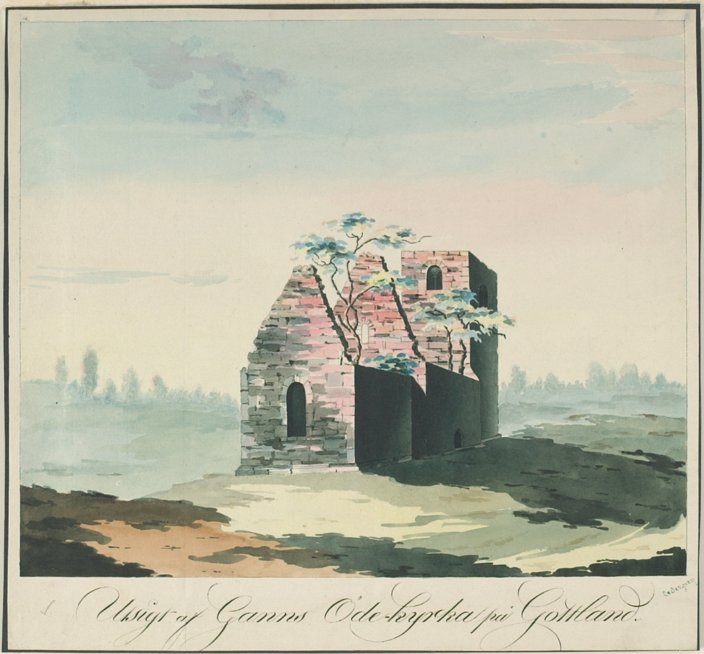 RAÄ-nummer Lärbro 220:1. Ruinen från nordost. Akvarellerad teckning från 1816-1830 av Lars Cedergren. Motiv: Lärbro 220:1 Nyckelord: Riksintressen Kategori: Akvarell, Kyrka/kapell RAÄ-nummer Lärbro 220:1. Ruinen från nordost. Akvarellerad teckning från 1816-1830 av Lars Cedergren. Lärbro 220:1.